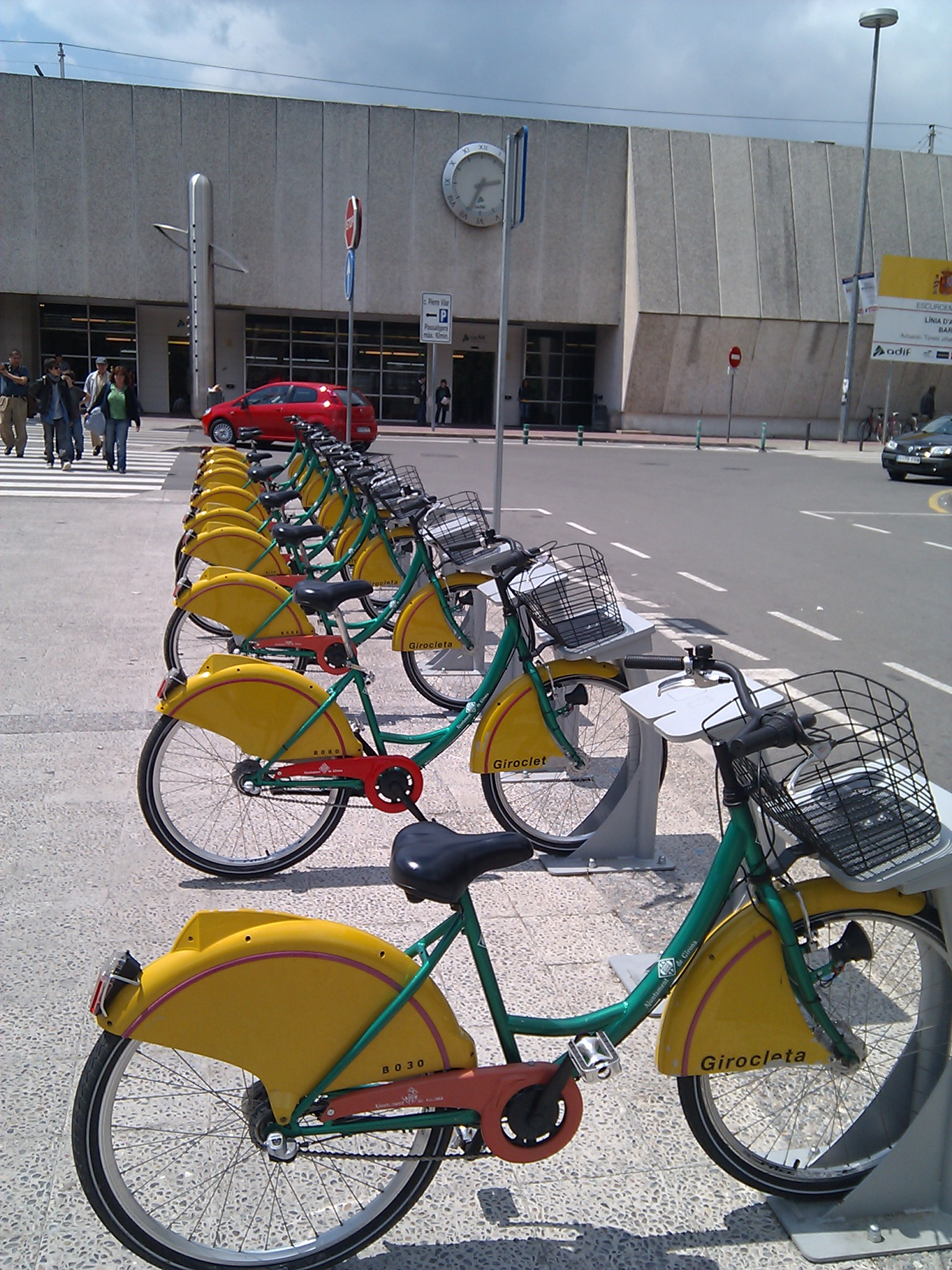 Girocletes davant l'estació de tren de Girona.